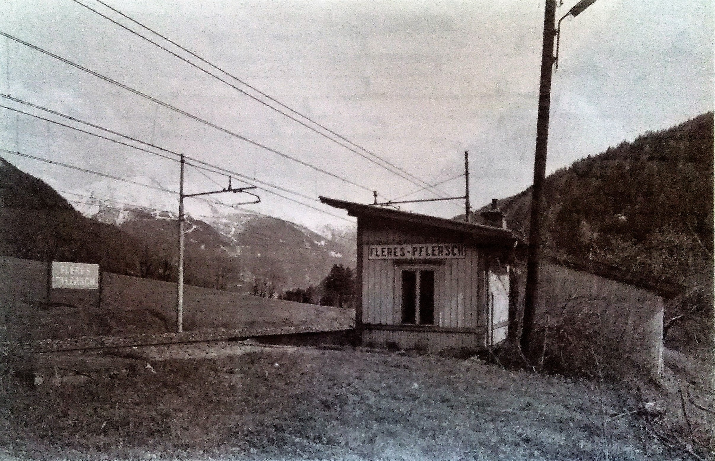 Fleres - Fermata dismessa